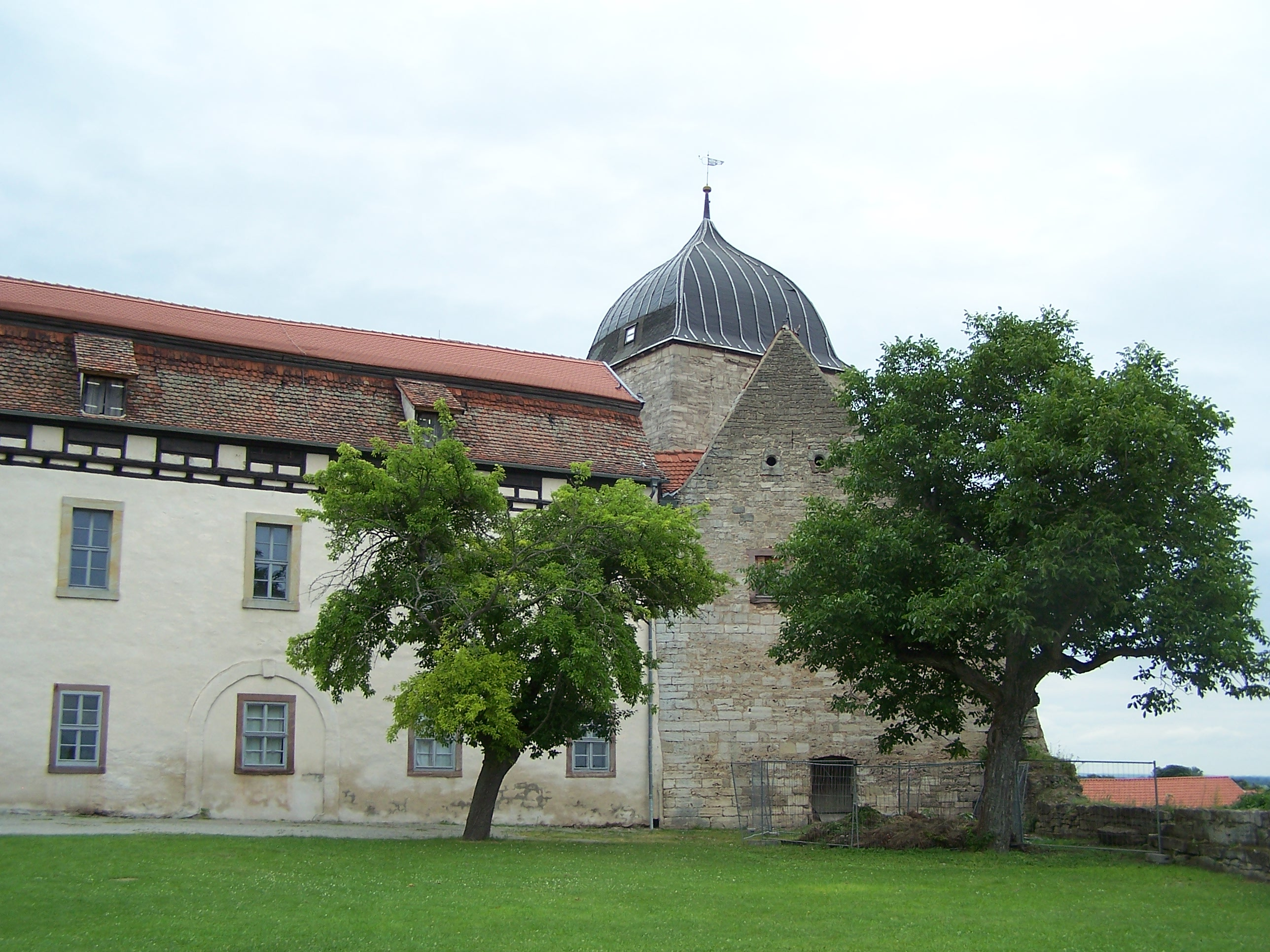 Runneburg